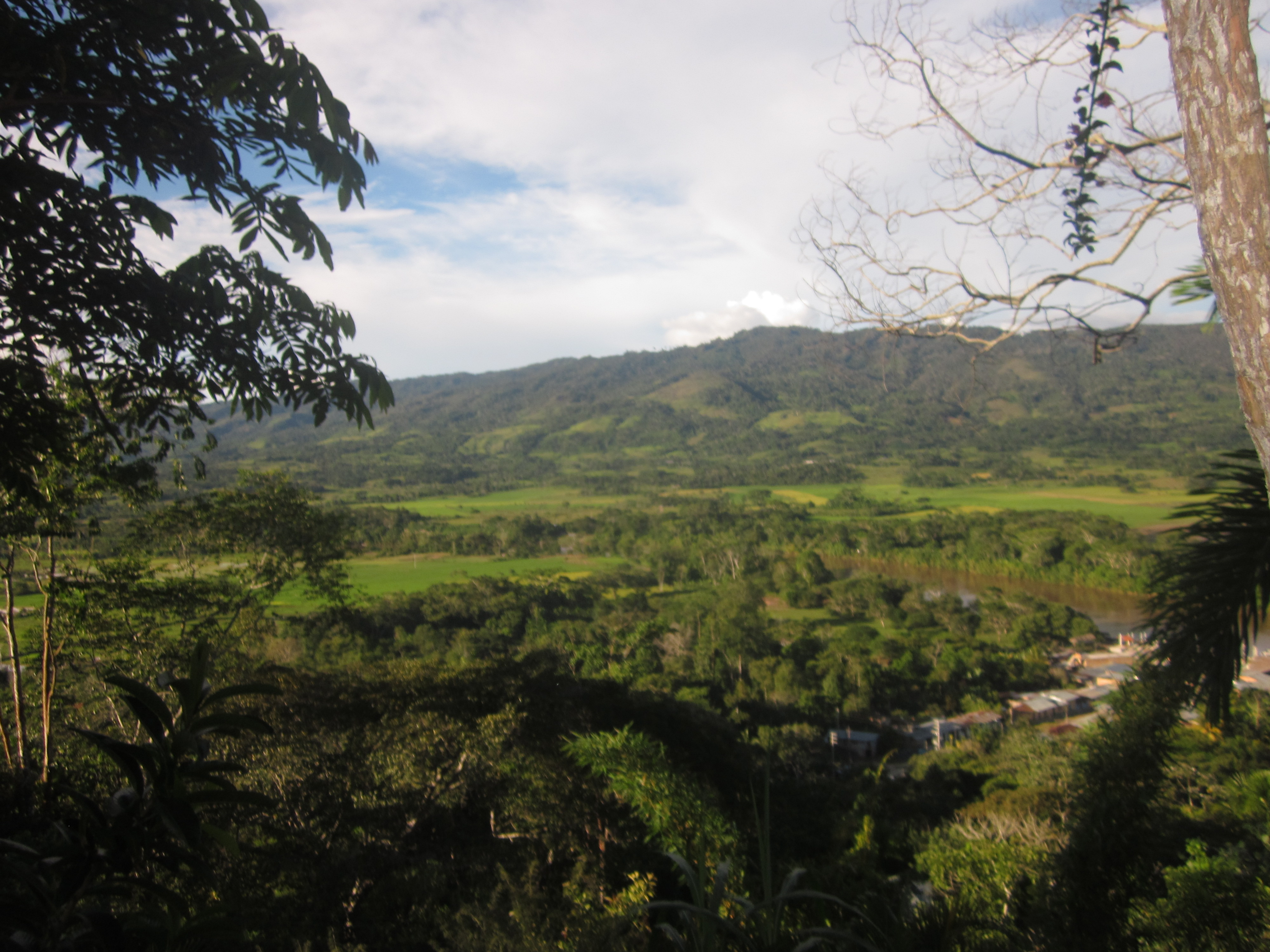 Valle del Alto Mayo junto al rio